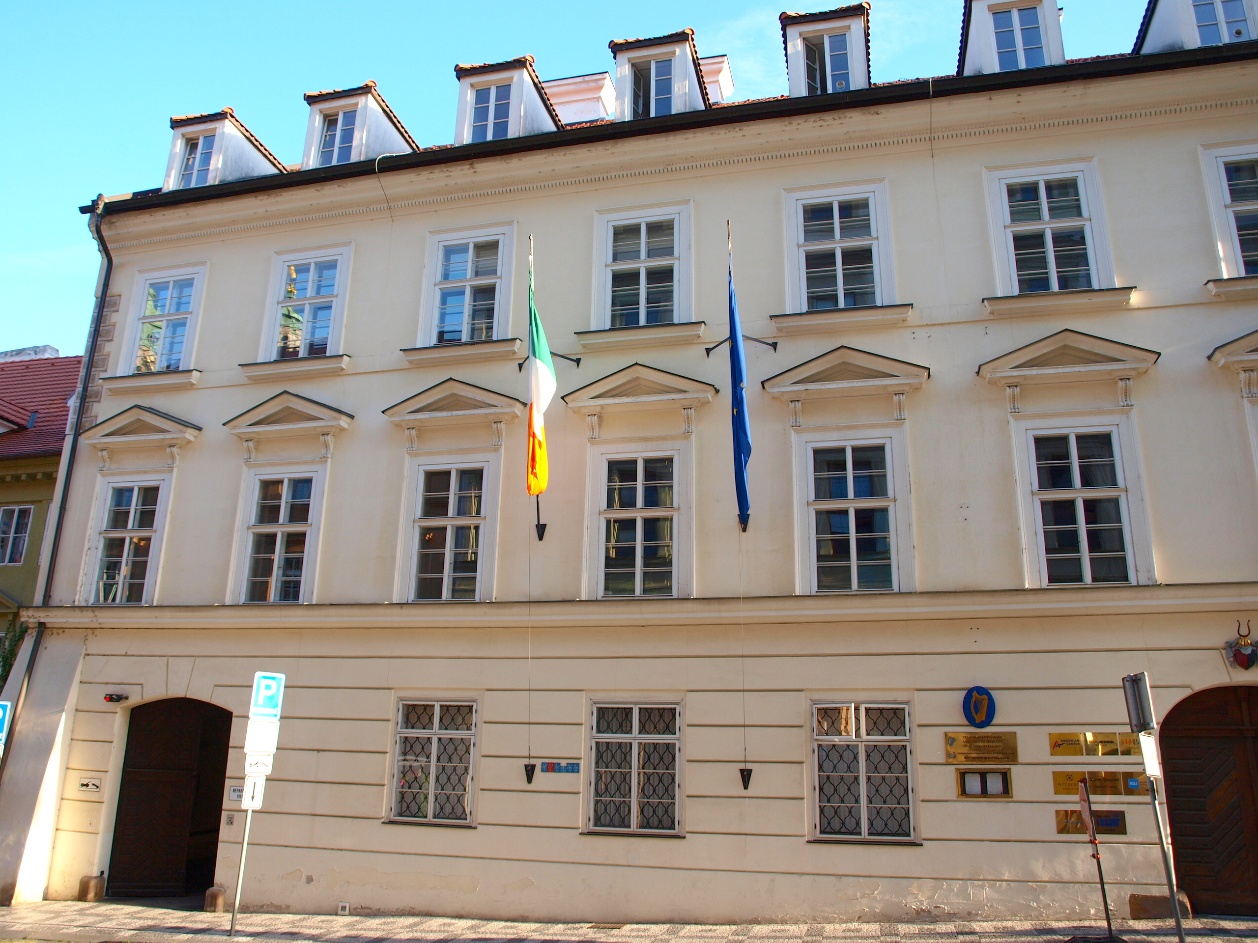 Vratislavský palác, Malá Strana